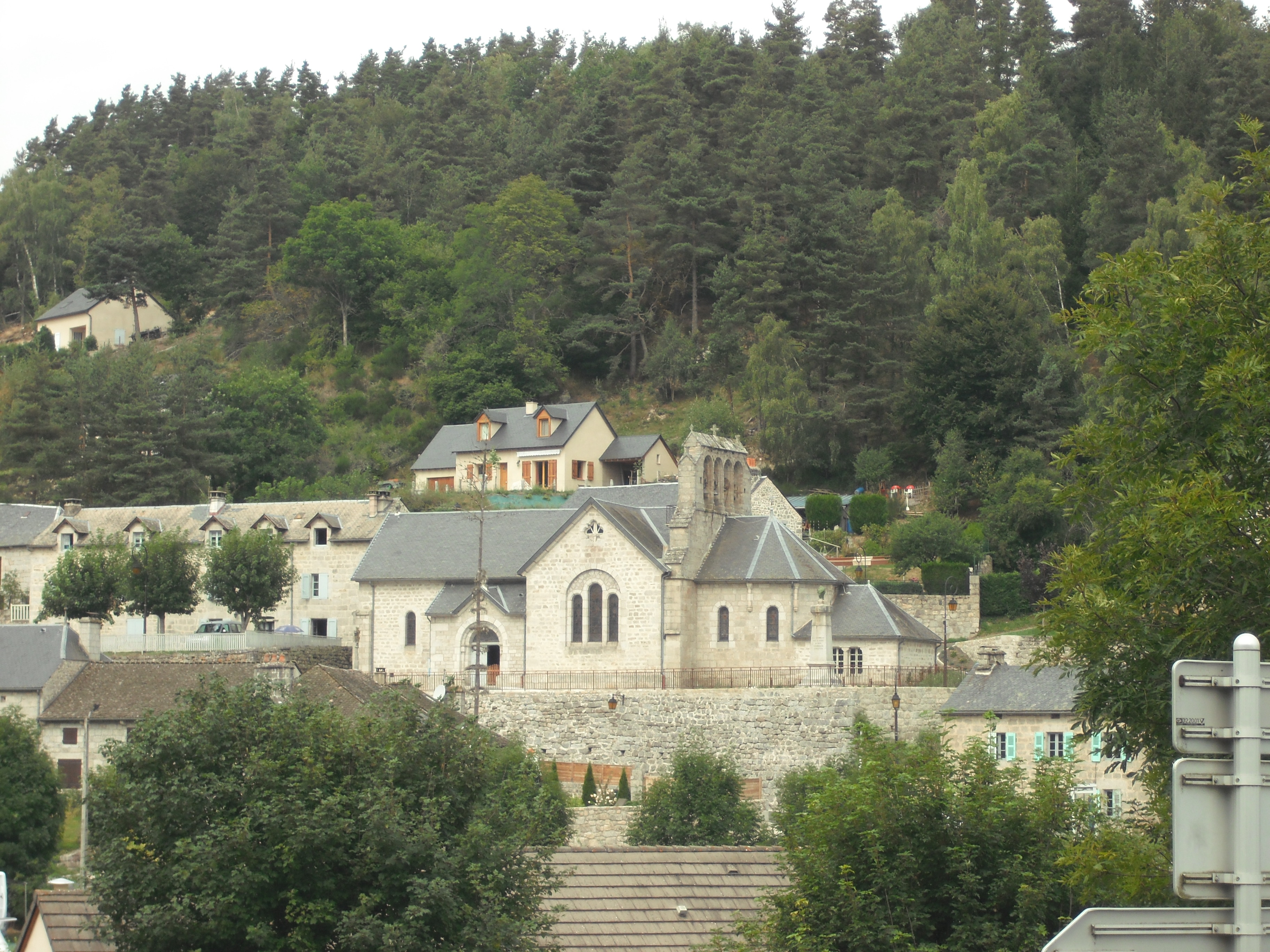 Eglise de Saint-Just (Cantal)